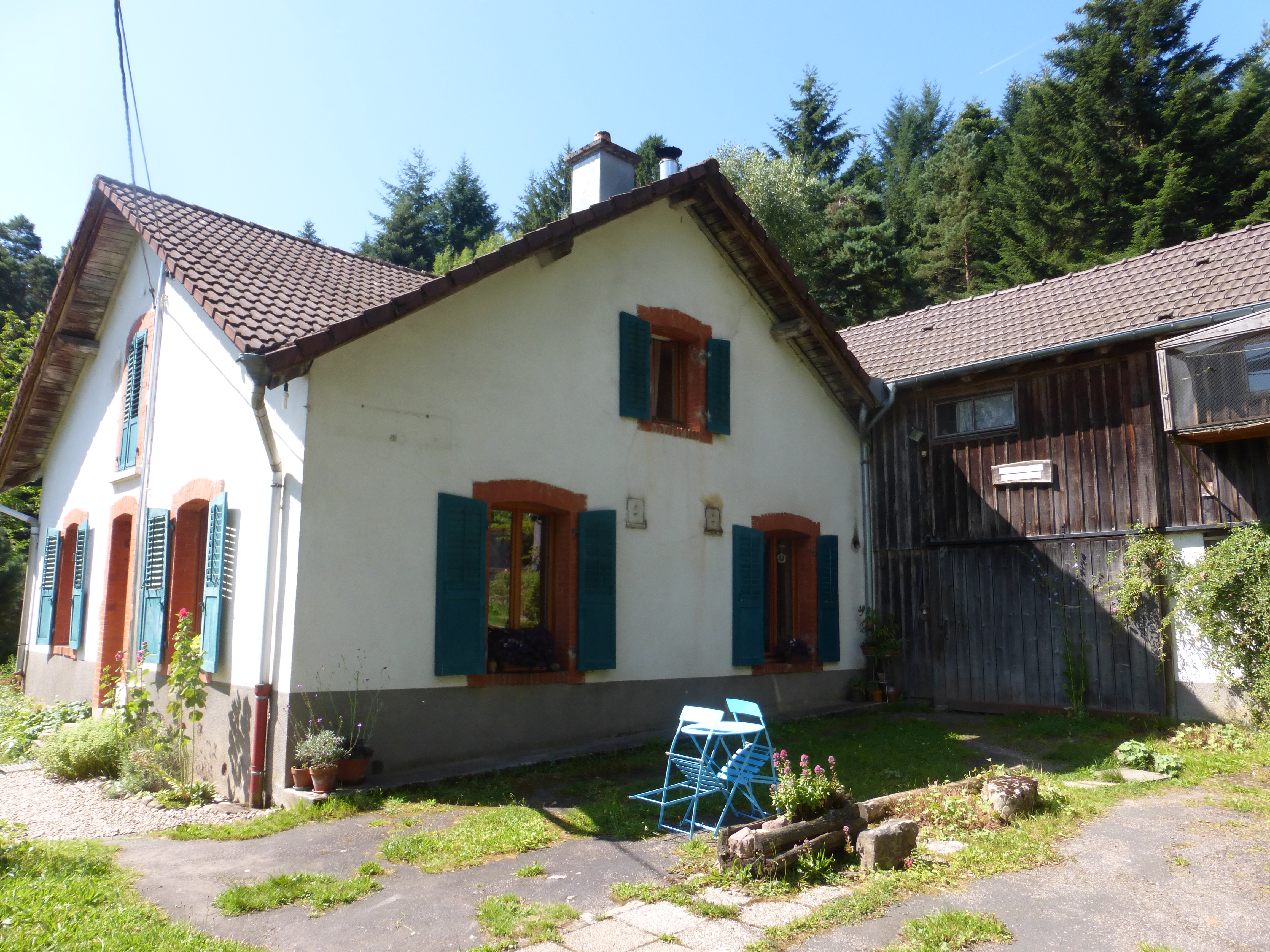 Maison forestière de La Madeleine à La Bolle - cour latérale